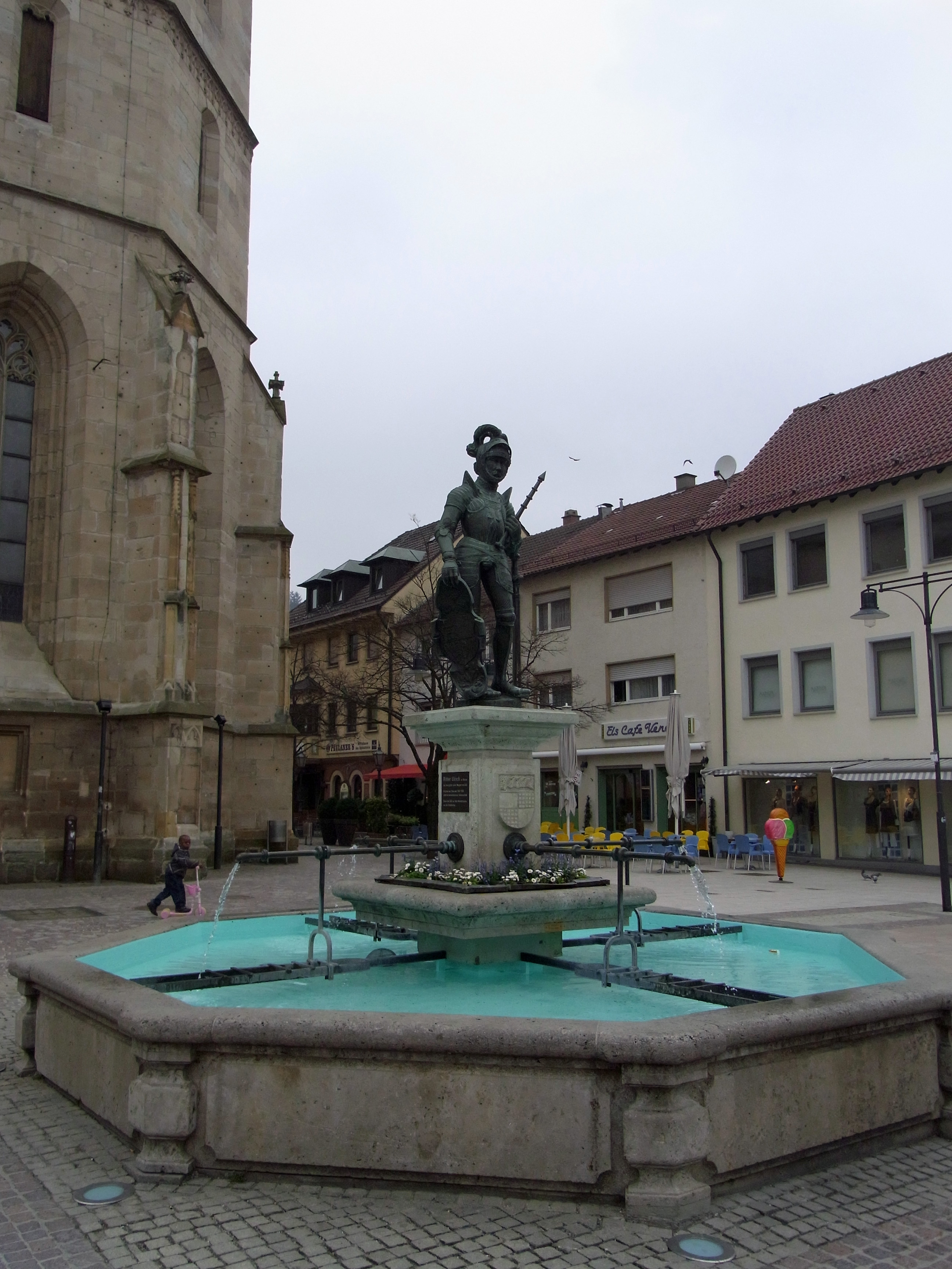 Balingen Standbild des Ritter Ulrich auf dem Marktplatz